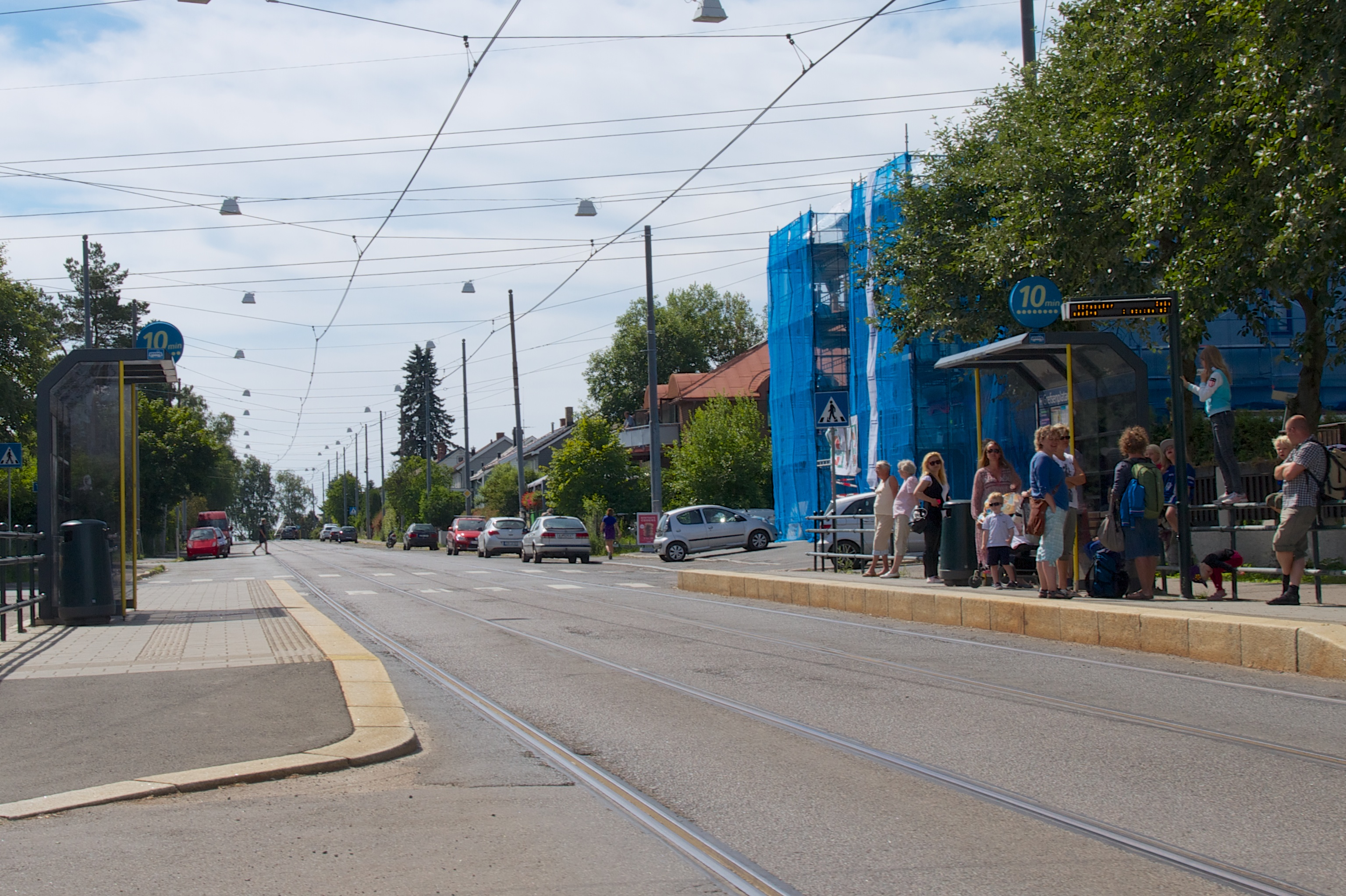 Grefsenplatået holdeplass.